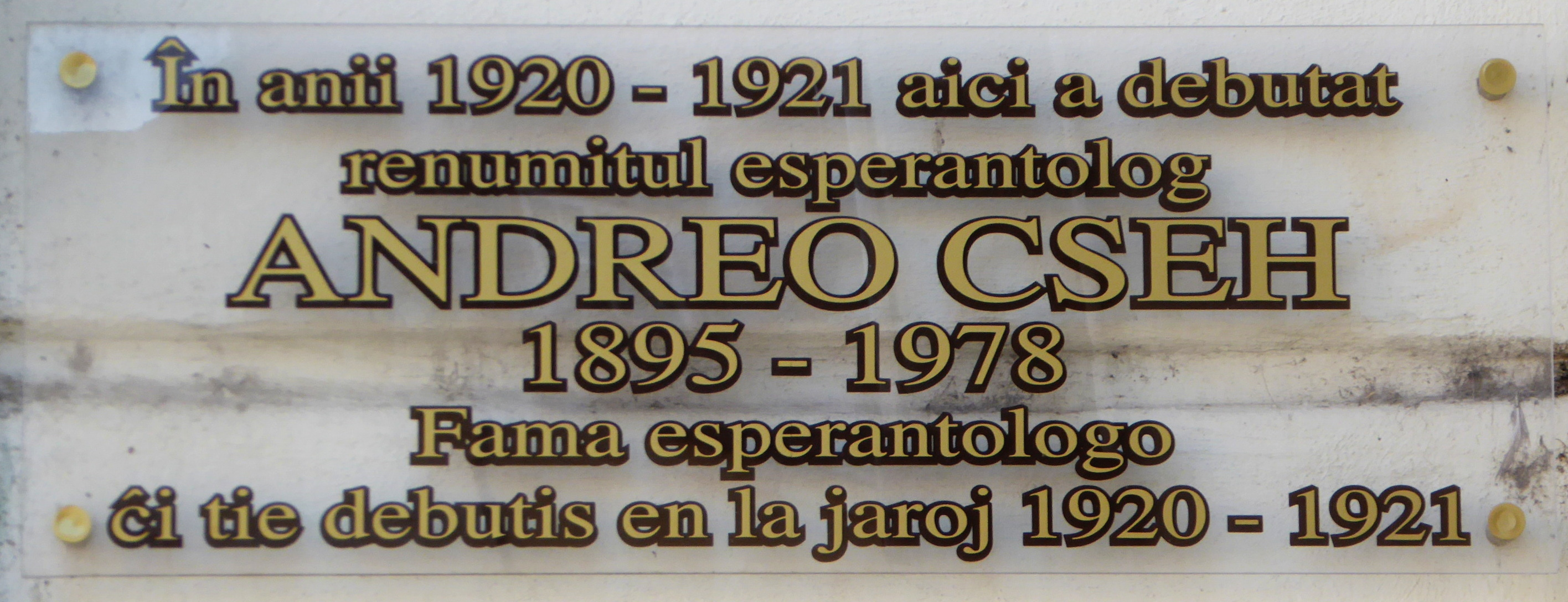 Hermannstadt, neue, transparente Gedenktafel für Andreo Cseh (2016)